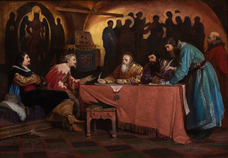 Вместе с работой «Русский посол при дворе римского императора» картина экспонировалась на Всемирной выставке в Париже. Вероятно, на картине изображены Филипп Крузиус и Отто Бругман – голштинские посланники из посольства Адама Олеария, прибывшие к царю Михаилу Федоровичу.